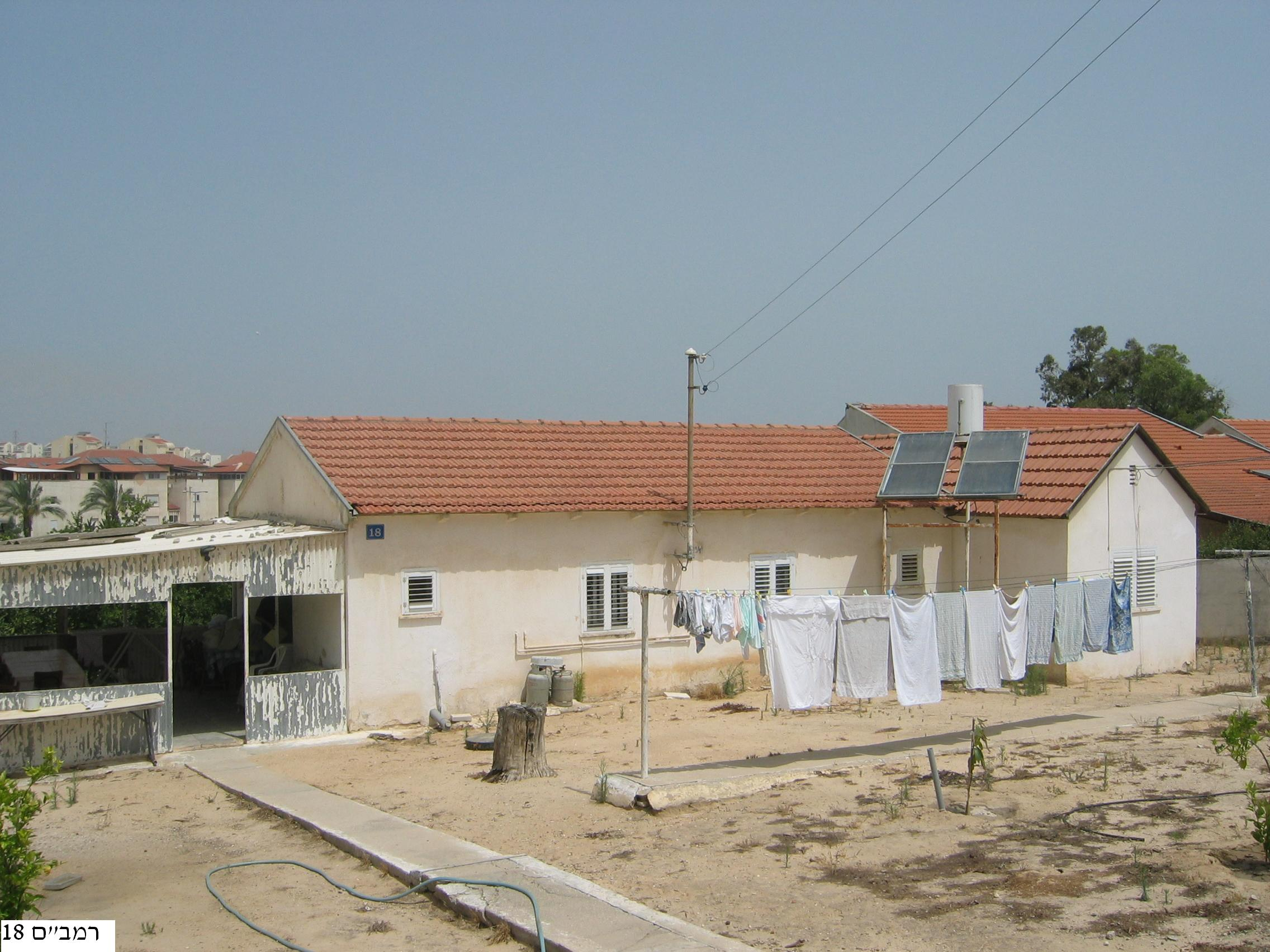 בית מגורים טיפוסי לראשוני הבתים שהוקמו ביישוב שדרות.